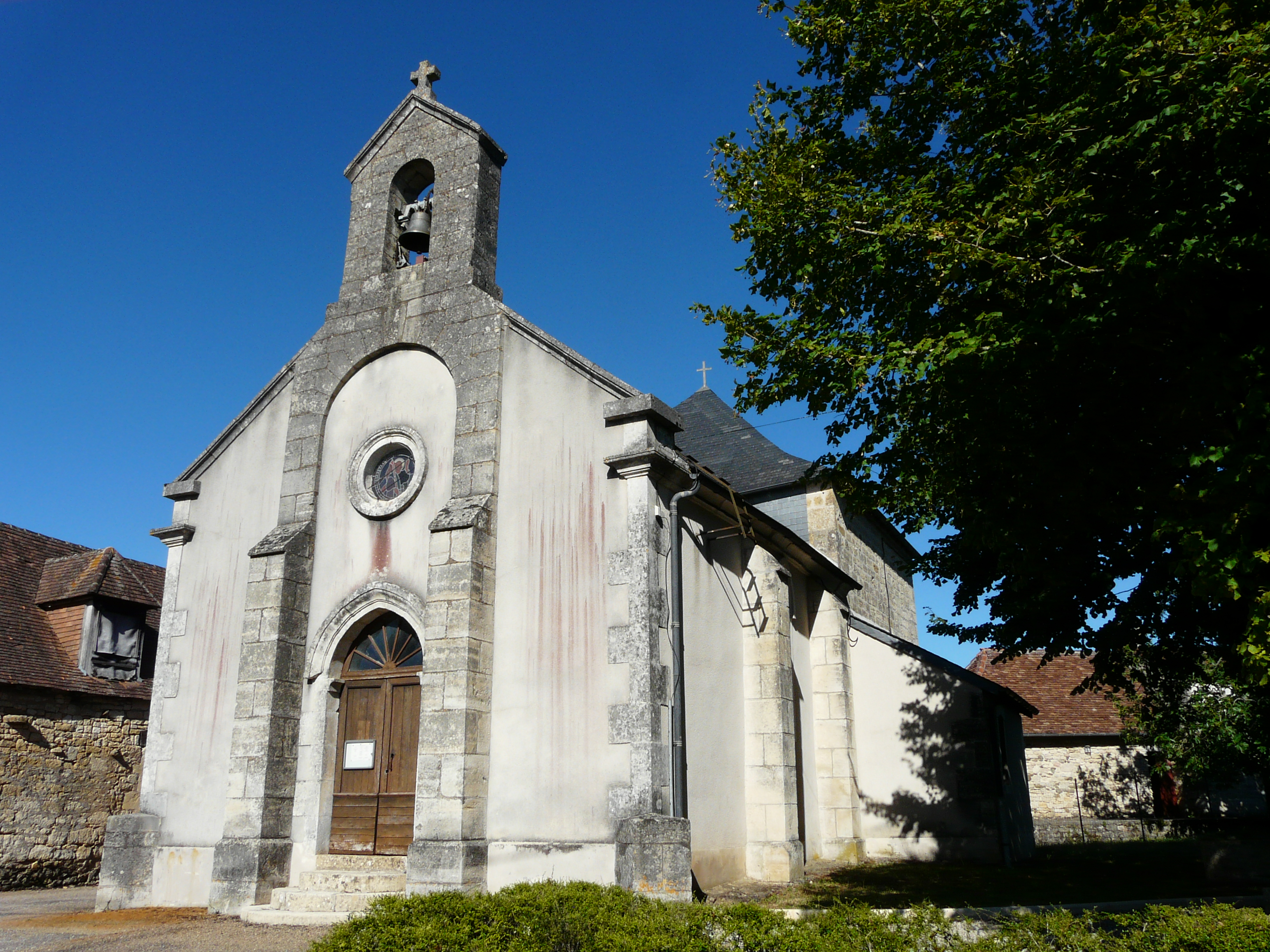 L'église de La Chapelle-Saint-Jean, Dordogne, France.